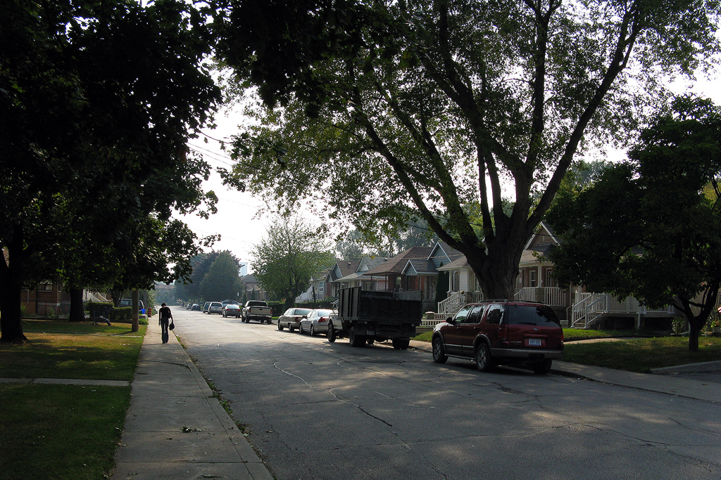 Cordella Avenue